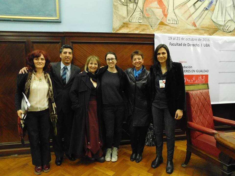 Mujeres en Igualdad